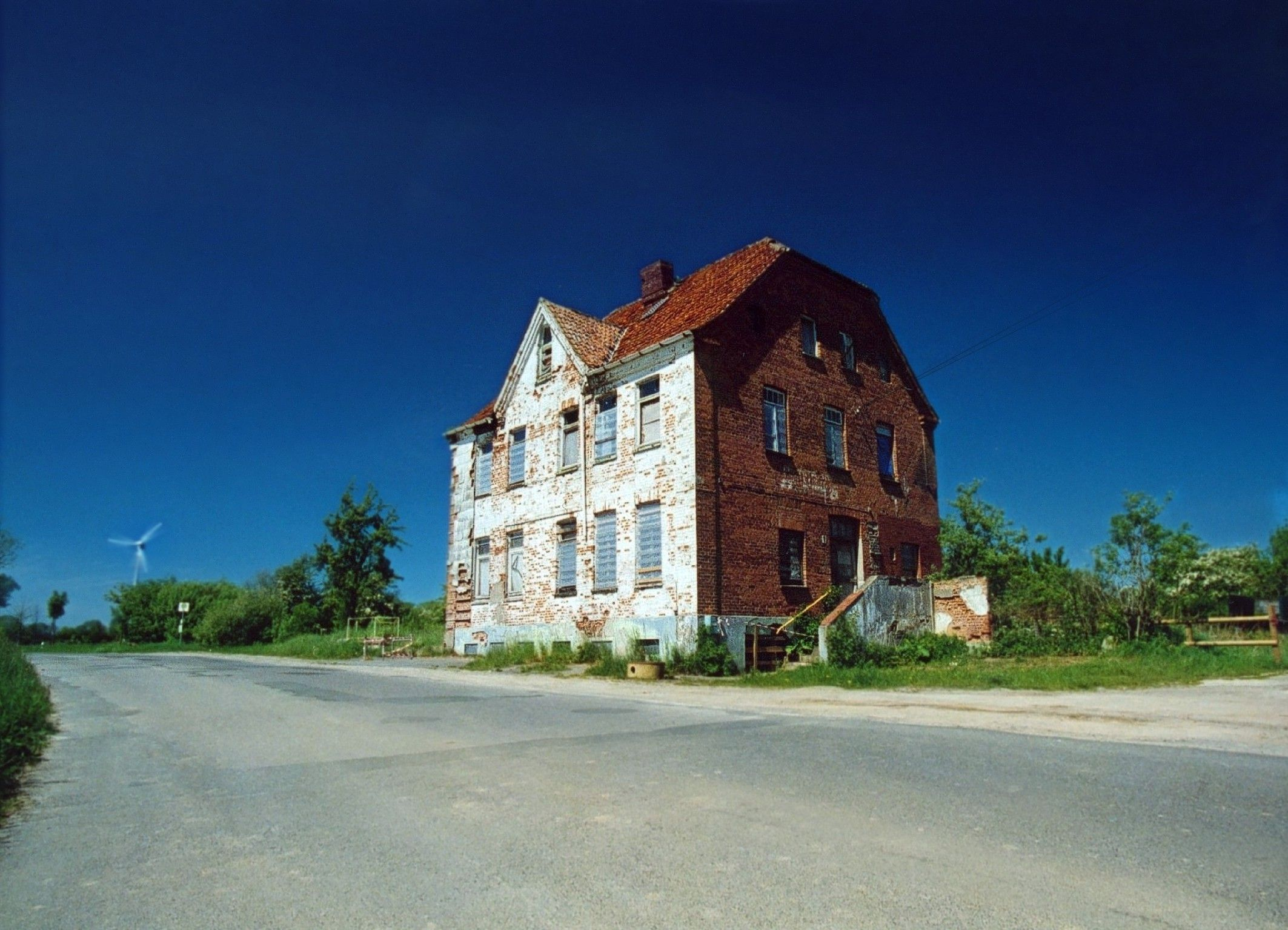 ehemalige Gaststätte "Oase"; bei Steinbek